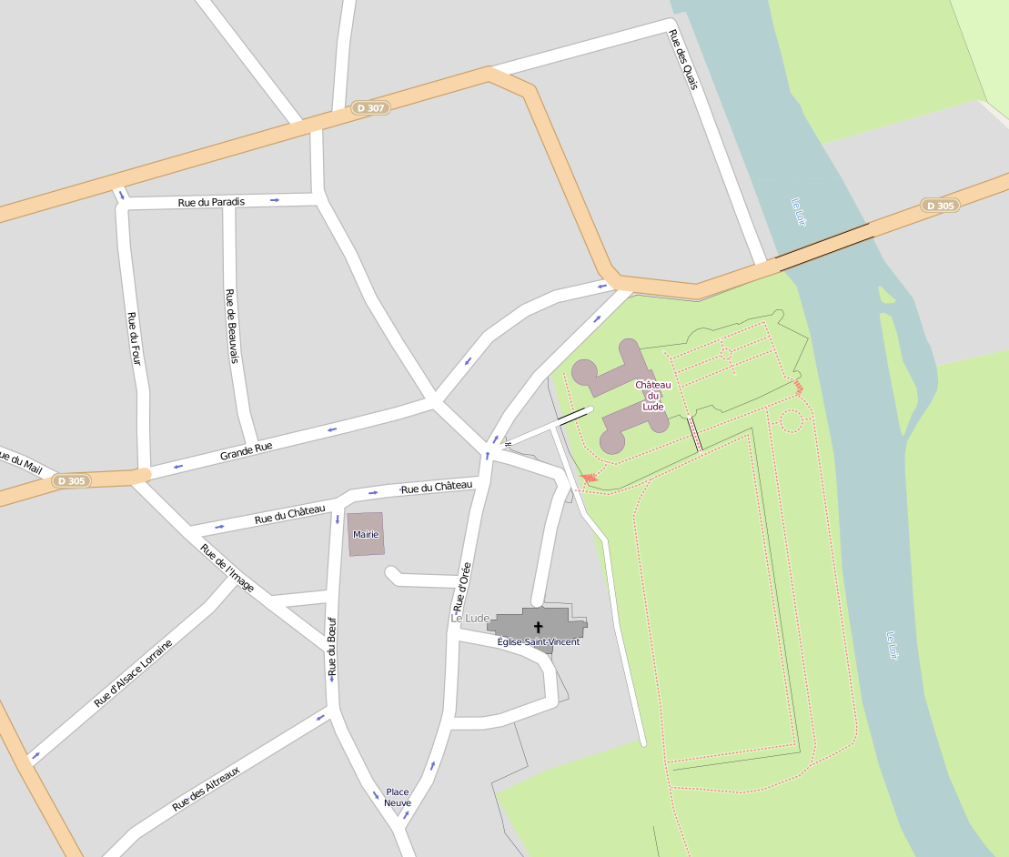 Le château du Lude et ses environs, sur la carte OpenStreetMap.